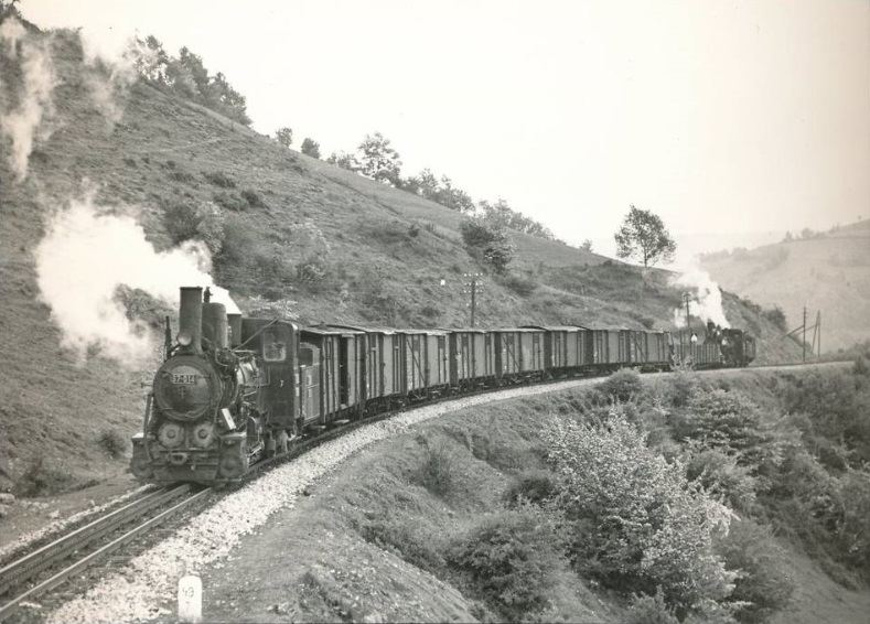 Dampfbetrieb auf der Zahnstangenstrecke am Komarsattel mit der Zuglok JŽ 97-014 und zwei Schiebelokomotiven